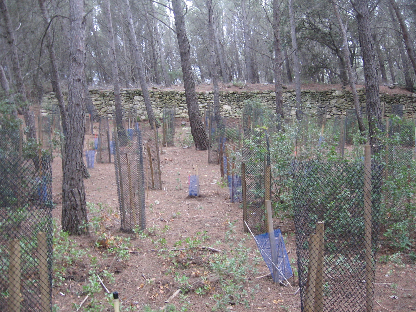 Plantations de feuillus sous couvert de pinèdes et arbustes